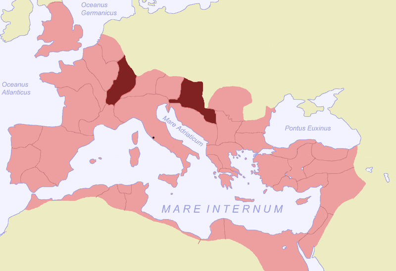 L'Empire romain avec la Germanie supérieure et la Pannonie en surlignées